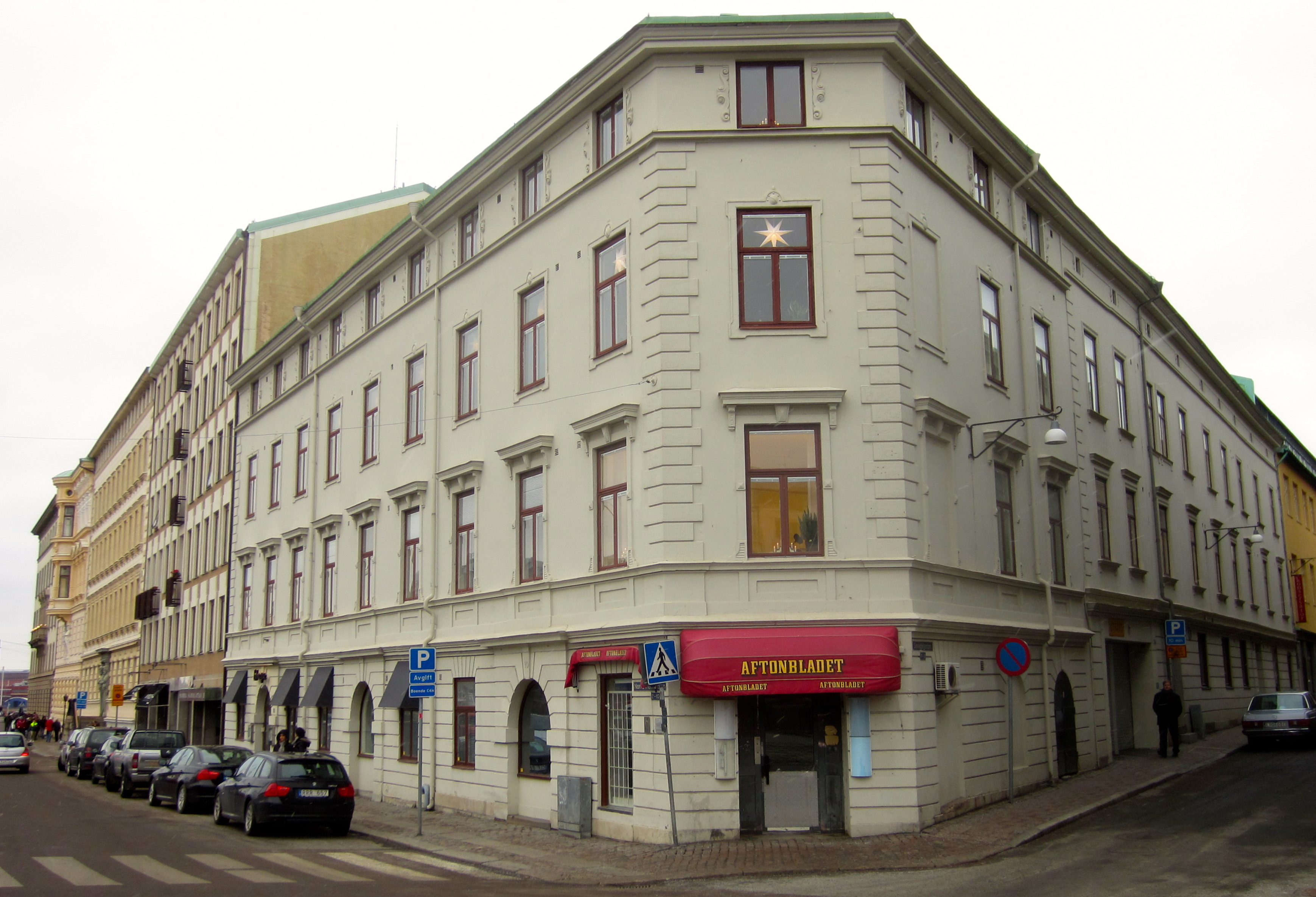 Radheska huset 2012